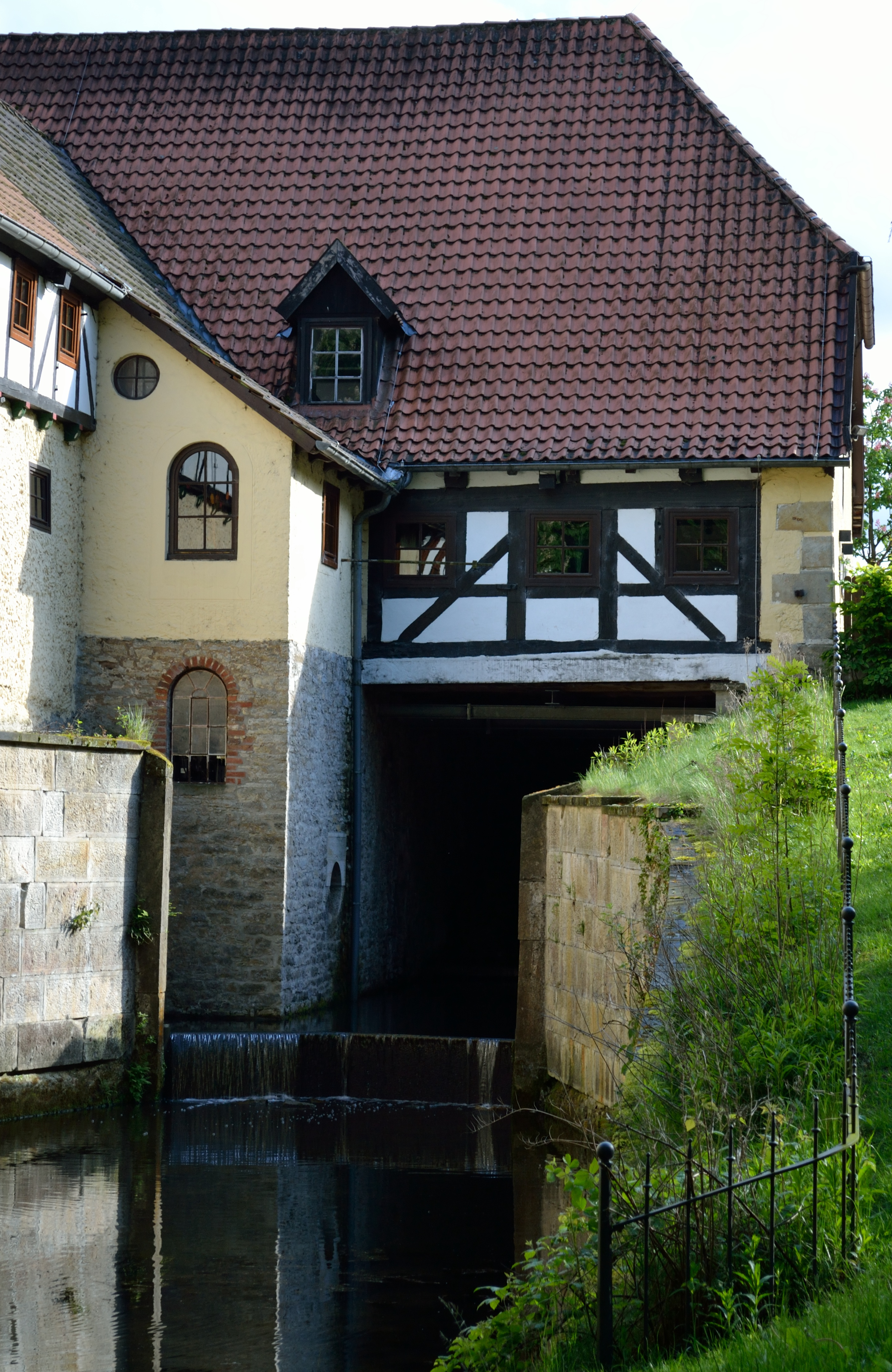 Obere Mühle in Detmold, Schleusenkammer